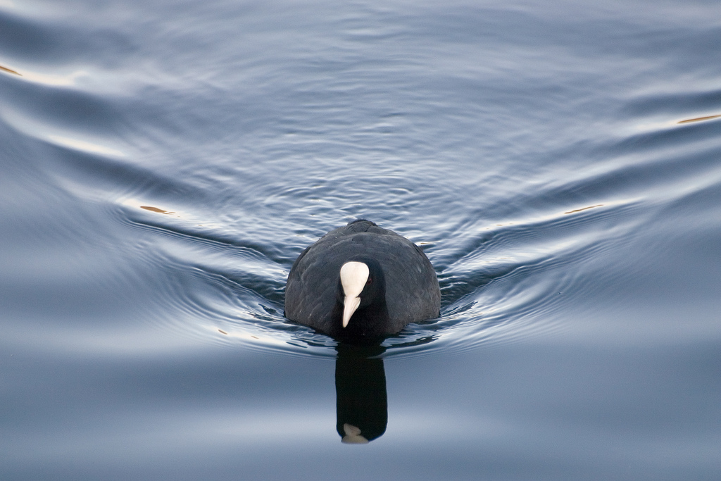 Focha, demo negro ou galiñola negra (Fulica atra). Tomada en Pastoriza (A Coruña, Galicia (Spain)). An acuatic bird forms a perfect "V" with its trail. Taken at Pastoriza (A Coruña, Galicia (Spain)).